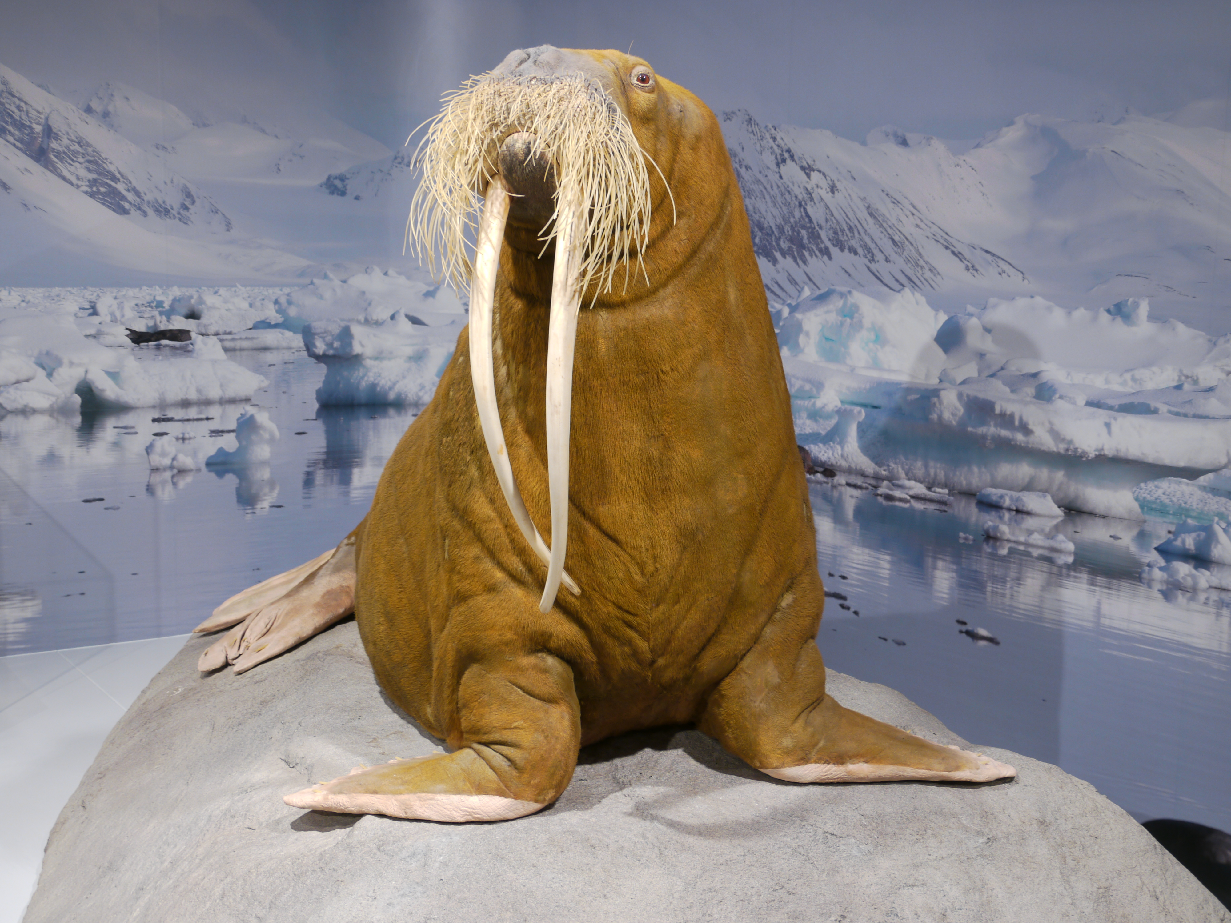 Präparierte Walrossdame "Antje" vor einer Fototapete des Nordpolarmeers im Zoologischen Museum Hamburg.